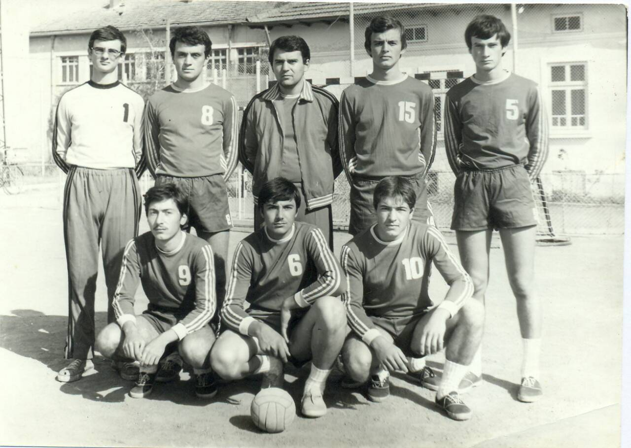 С ХК "Кубрат" - Юноши, "А" група, 1977г.-1979г. Стефан Калинов - клекналият в средата.